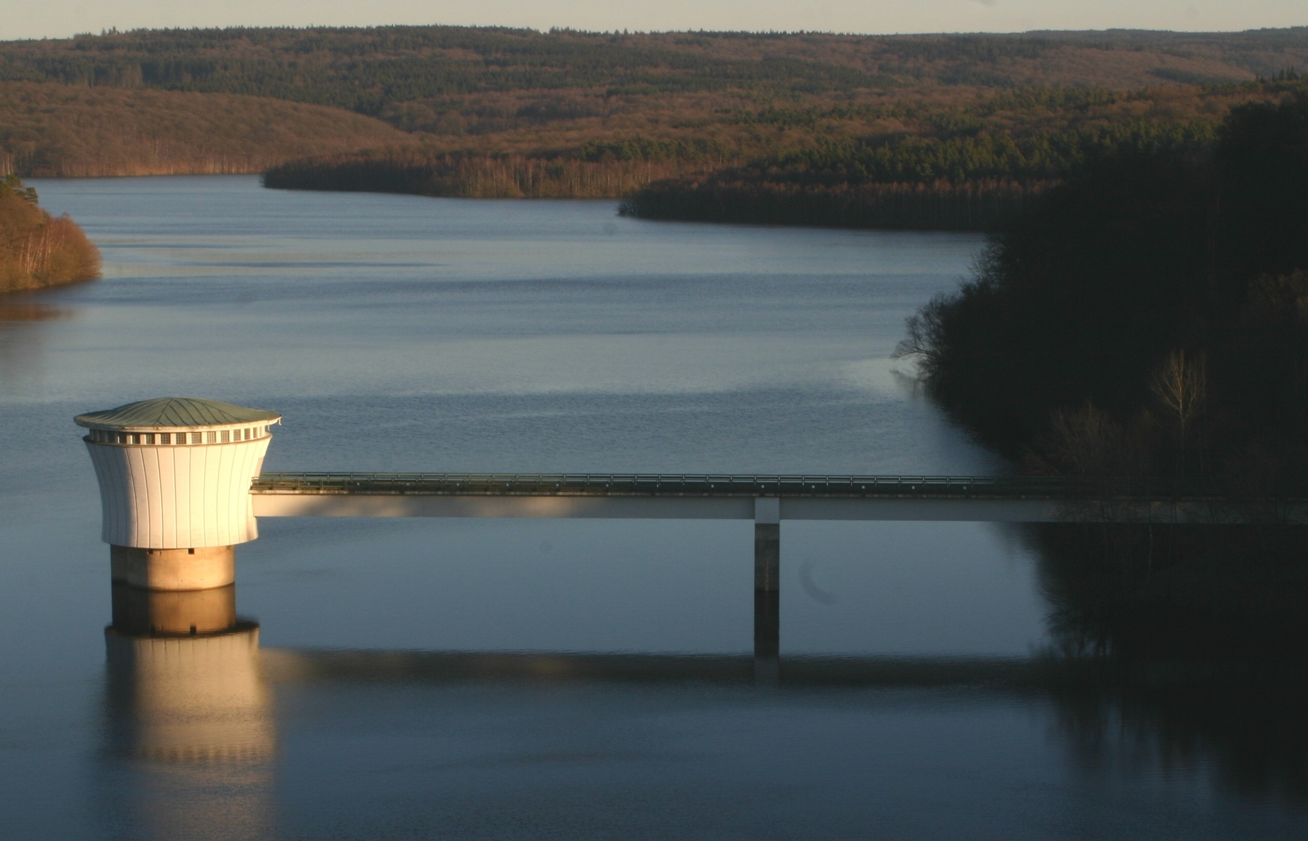 De lénkse Waasserschacht vun der Gileppetalspär.